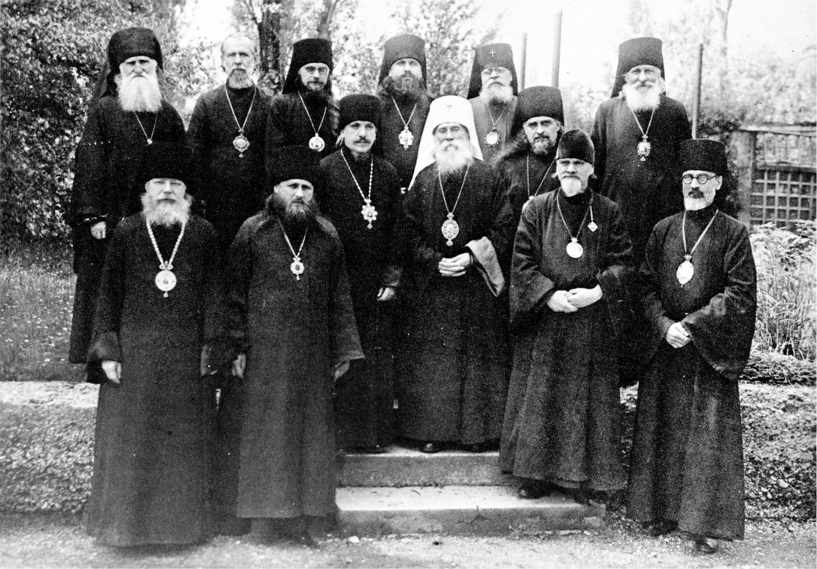 Архиерейский собор РПЦЗ 1946 года: верхний ряд: епископ Стефан (Севбо), епископ Феодор (Рафальский), епископ Афанасий (Мартос), архиепископ Филофей (Нарко), архиепископ Венедикт (Бобковский), епископ Евлогий (Марковский), средний ряд: архиепископ Пантелеимон (Рудык), митрополит Анастасий (Грибановский), епископ Венский и Австрийский Димитрий (Маган). нижний ряд: епископ Сант-Ягский Серафим (Иванов), епископ Леонтий (Филиппович), епископ Григорий (Боришкевич), епископ Киссингенский Александр (Ловчий).